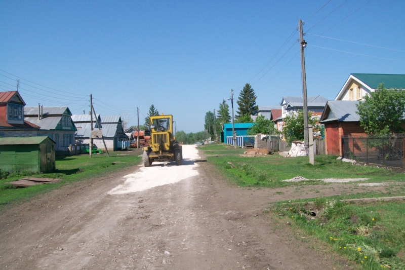 Завершился ремонт дороги местного значения по ул. Центральная в деревне Новое Изамбаево